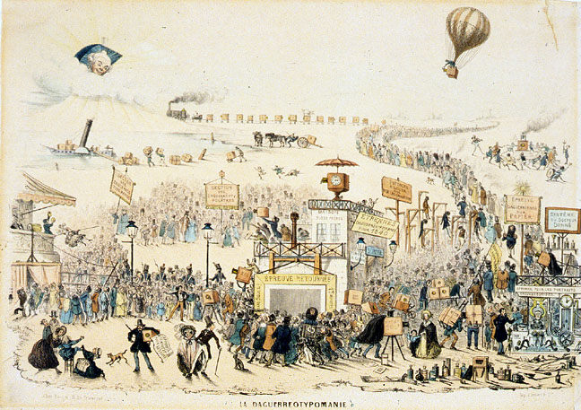 Lithografie La Daguerréotypomanie aus La Caricature vom 8. Dezember 1839